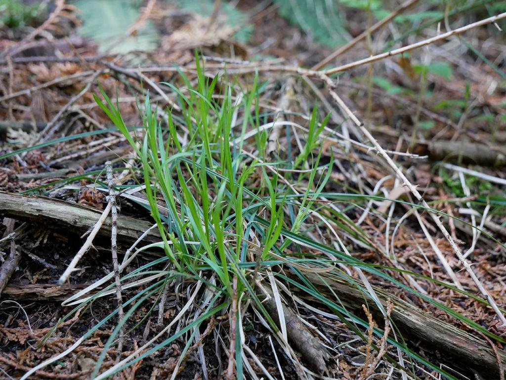 2019/05/08 静岡県富士宮市：Hujinomiya City, Shizuoka Pref. Japan